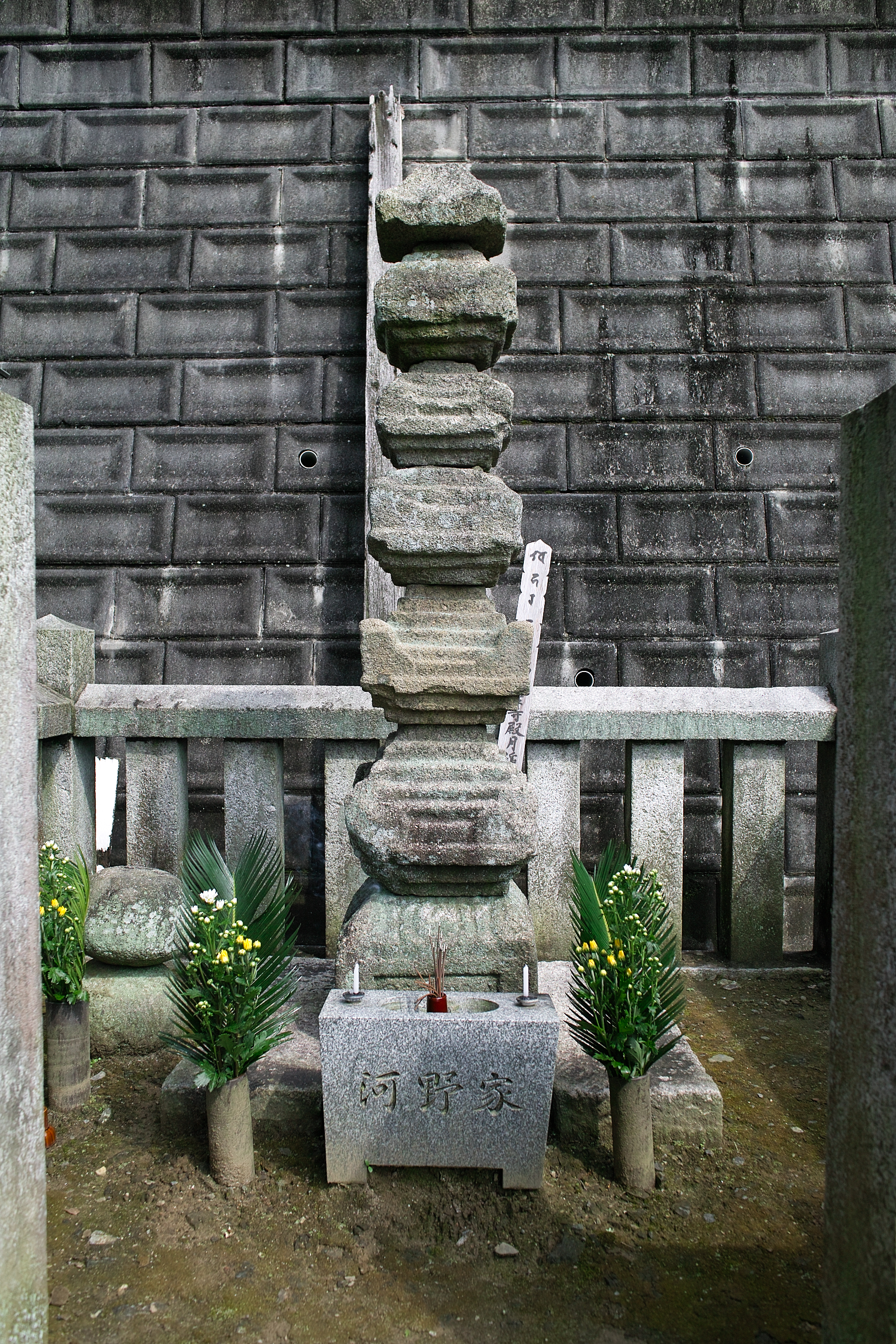 長生寺（広島県竹原市）の河野通直供養塔